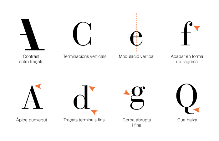 Bauer Bodoni características